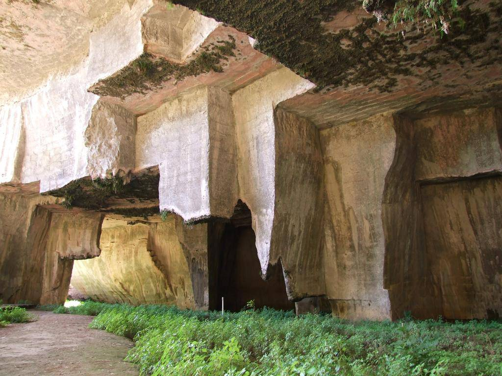 Grotta dei Cordari - Latomia del Paradiso, nella Neapolis di Siracusa, Sicilia.